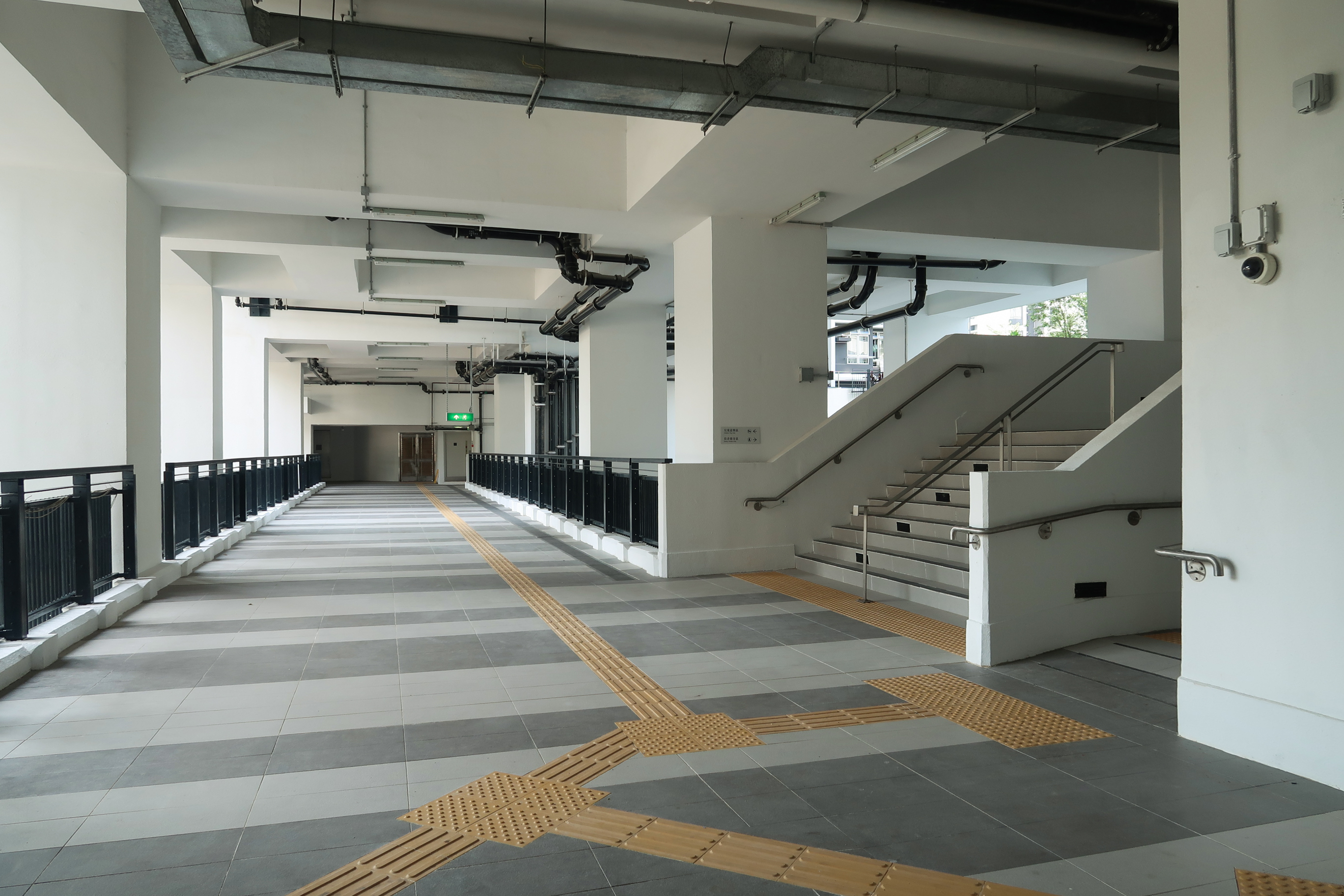 Kwai Tsui Estate P1 Access